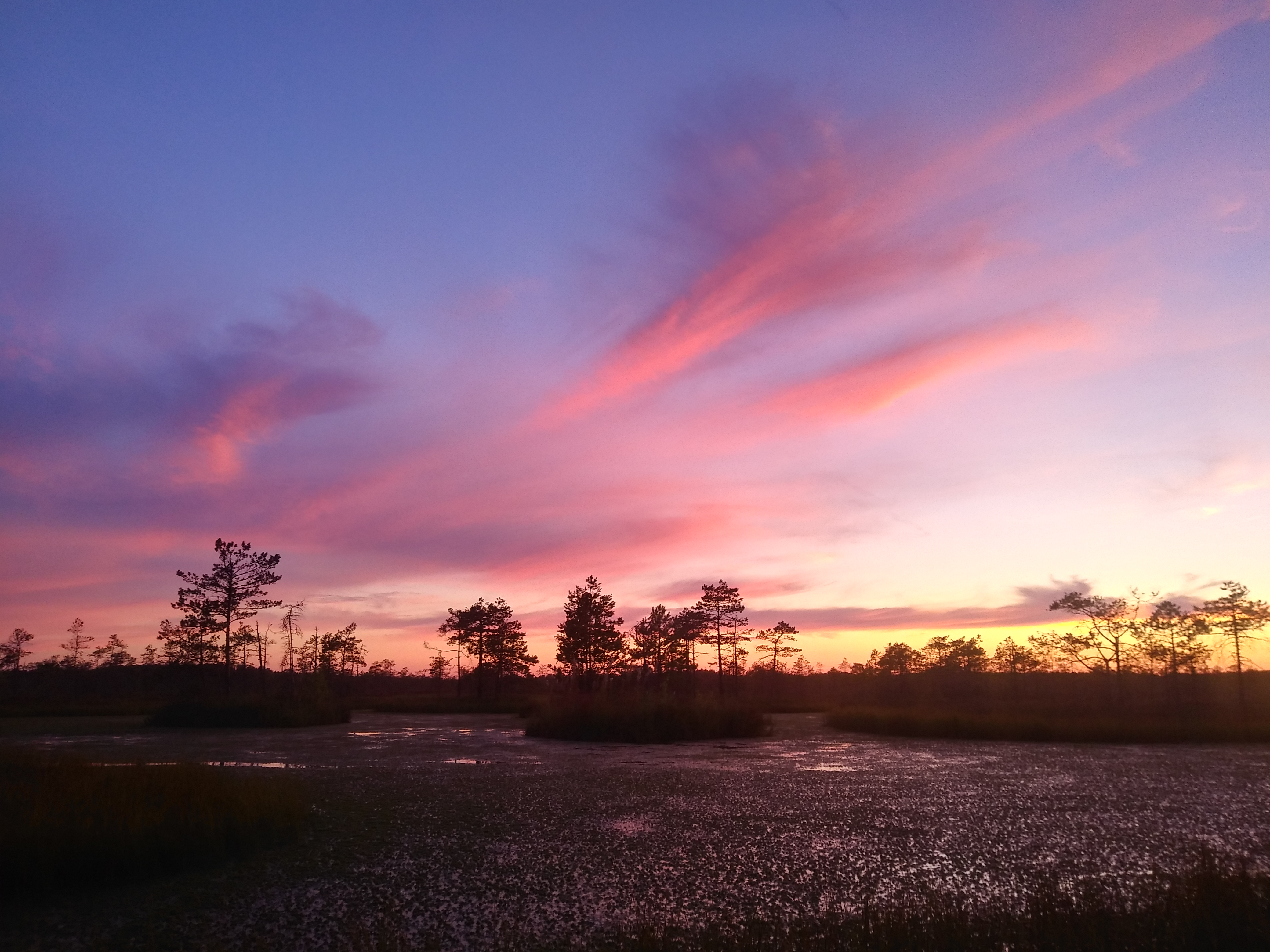 Loojang Meelva rabas